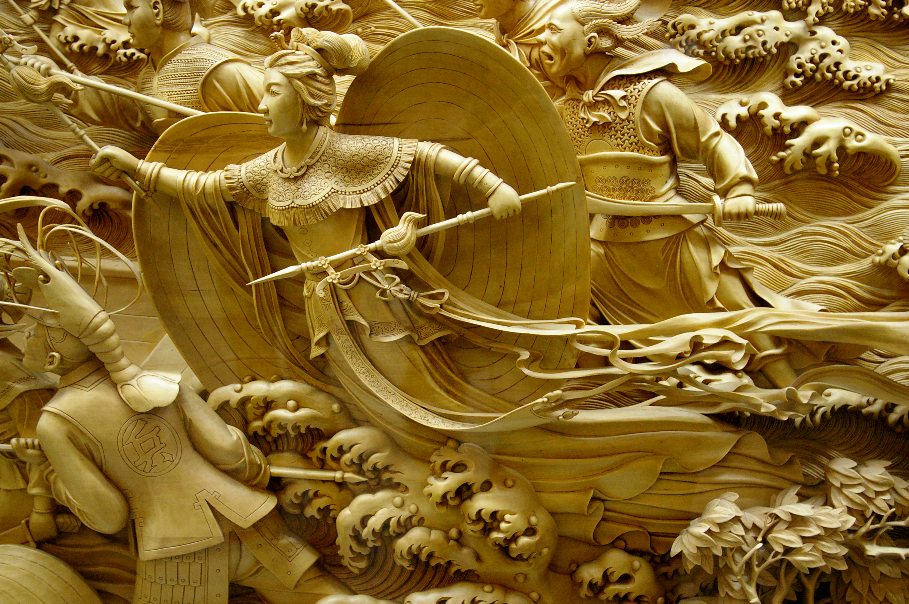 Fragment płaskorzeźby przedstawiającej Legendę o Białym Wężu w Pagodzie Leifeng w Hangzhou